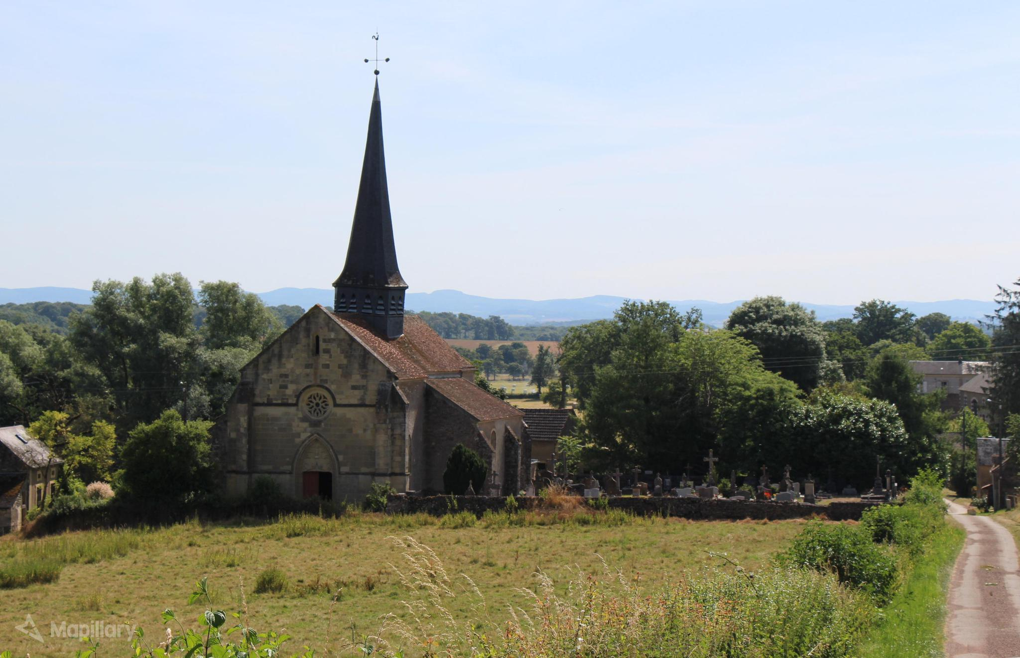 Eglise de Héry, Nièvre (58-FR). Église Saint-Andoche, édifice à chevet plat du xiiie siècle, éclairé d'une fenêtre à remplage et d'une rosace gothique. Nef et bas-côtés du xve siècle. Le clocher central est un chef-d'œuvre de charpenterie. Ouverte sur demande. (src : )